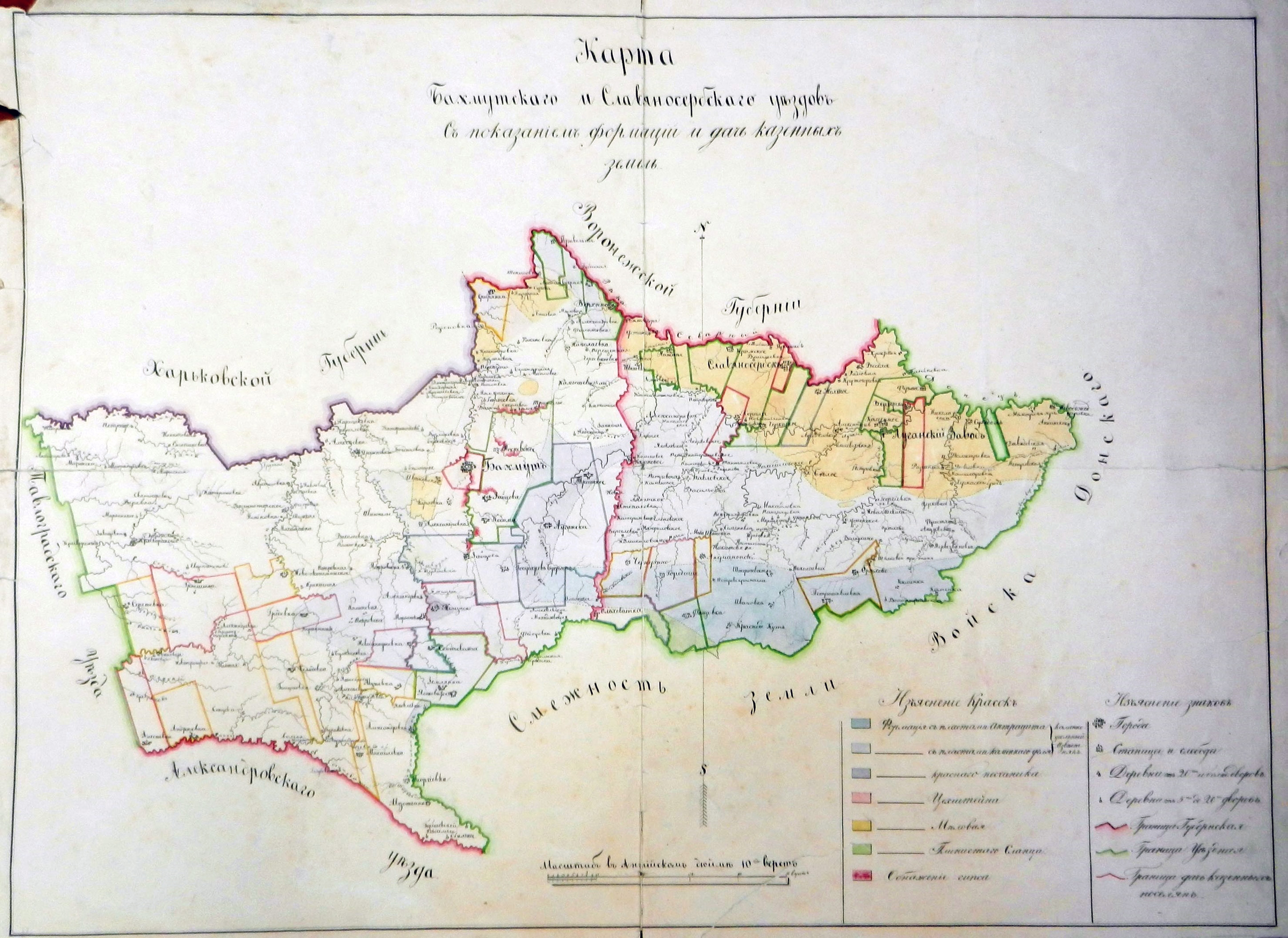 Карта Бахмутського і Слов'яносербського повітів з показанням формацій і дач казенних земель (30-і рр. XIX ст.)